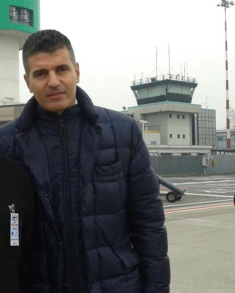 Мэр коммуны Орио-аль-Серио на инаугурации первого рейса авиакомпании Победа связавшего Москву с Бергамо, 21.12.2015